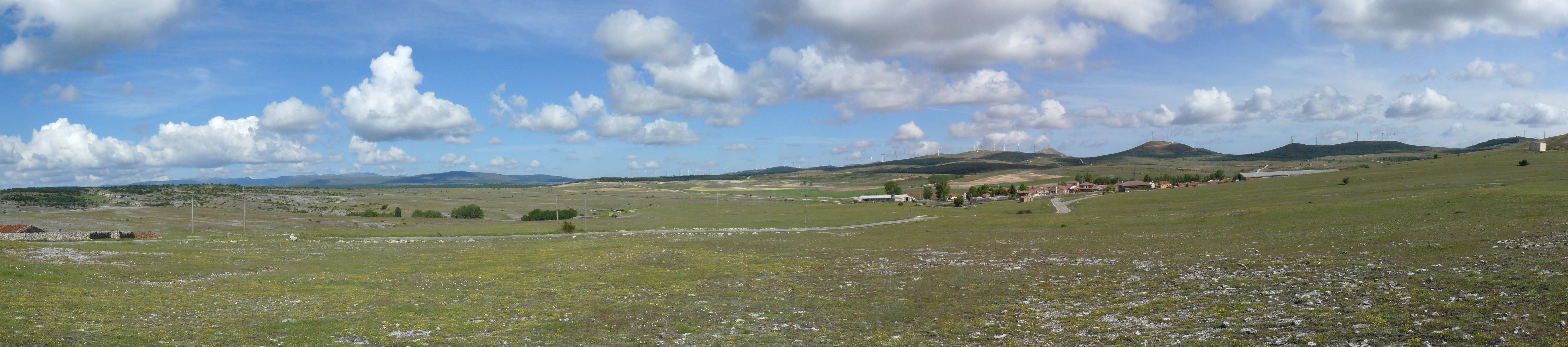 Campisábalos, la Sierra de Pela y la Sierra de Ayllón desde el Sur.